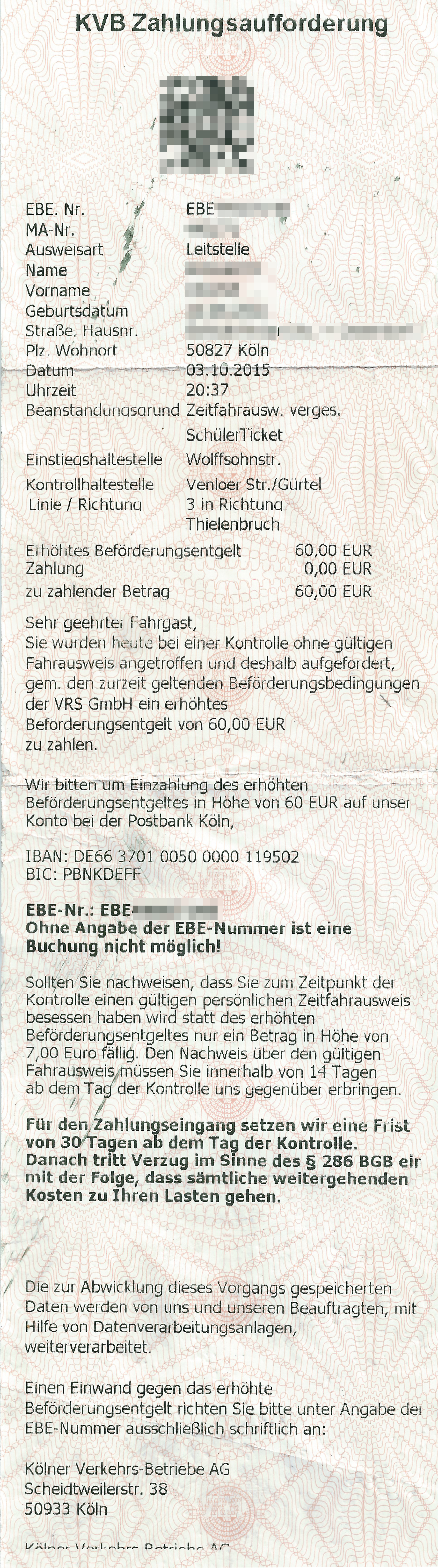 Zahlungsaufforderung der Kölner Verkehrsbetriebe (KVB) für ein Erhöhtes Beförderungsentgelt in Höhe von EUR 60,00